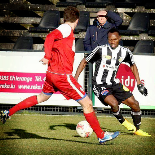 Désiré Sègbè Azankpo est né le 6 Mai 1993 au Bénin. Du haut de ses 21 ans, il est international béninois depuis le 17 Mai 2014. Ses prouesses techniques, ses conduites de balle, sa puissant athlétique, sa lourde frappe, sa pointe de vitesse phénoménale et ses passements de jambes hors pairs ont poussés le sélectionneur des Ecureuils du Bénin a lui confié la pointe de l’attaque de l’équipe nationale du Bénin.